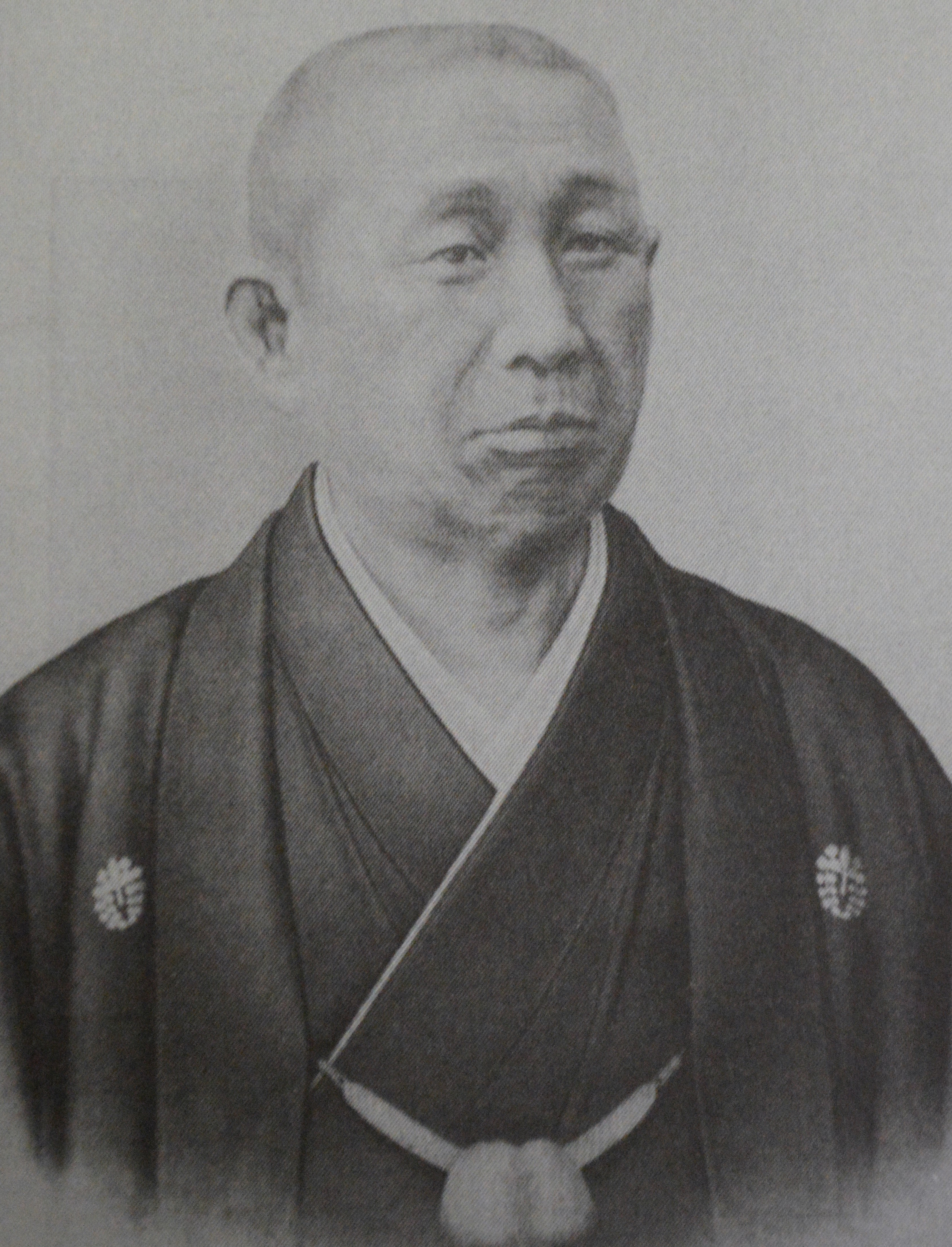 愛知県碧海郡西尾町（現・西尾市）出身の実業家である岩瀬弥助。